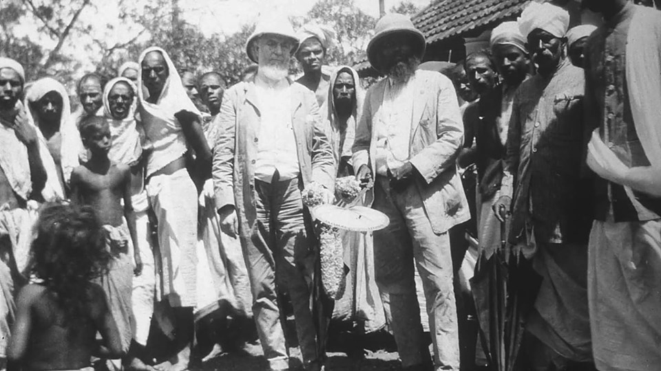 1912 ലെ ചിത്രം, റസ്സൽപുരം, തിരുവനന്തപുരം. യഹോവയുടെ സാക്ഷികളുടെ (അന്ന് ബൈബിൾ വിദ്യാർത്ഥികൾ എന്നറിയപ്പെട്ടിരുന്നു) പ്രാരംഭകാല പ്രചാരകൻ ആയിരുന്ന ചാൾസ് റ്റേസ് റസ്സൽ 1912 ൽ തിരുവനന്തപുരം ജില്ലയിലെ ബാലരാമപുരത്തിനു സമീപം ഉള്ള ഒരു ഗ്രാമത്തിൽ വെച്ചു എടുത്ത ചിത്രം.